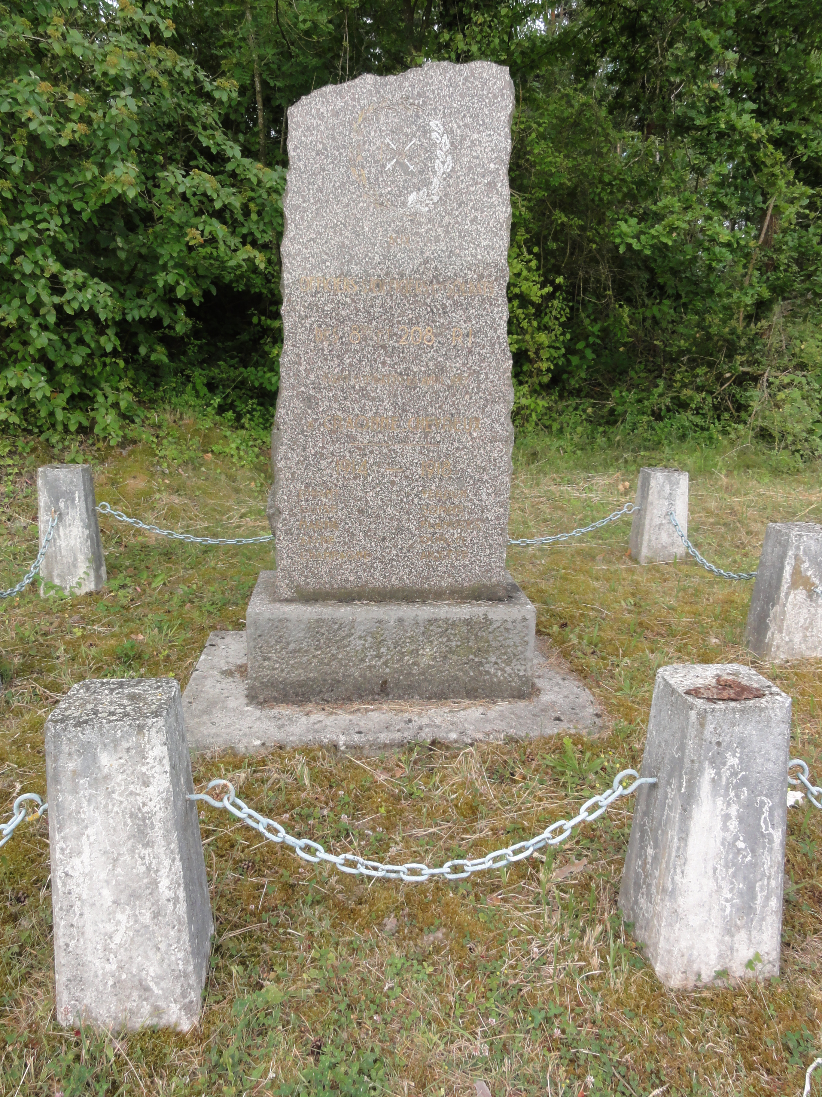 Craonne (Aisne) mémorials 8e + 208e R.I.